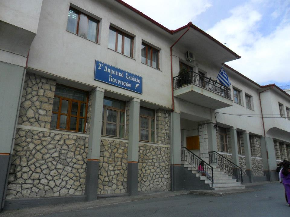 Πρόσοψη του 2ου Δημοτικού Σχολείου